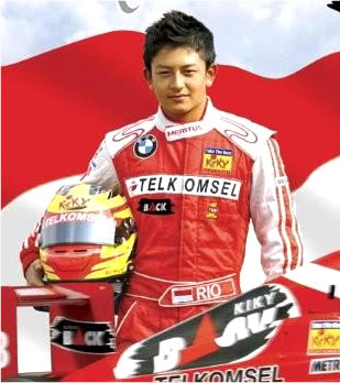 Rio Haryanto en 2010